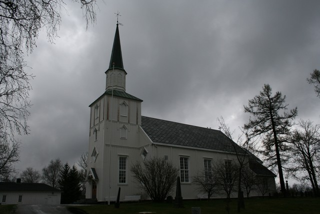 Fauske kyrkje en: Fauske church